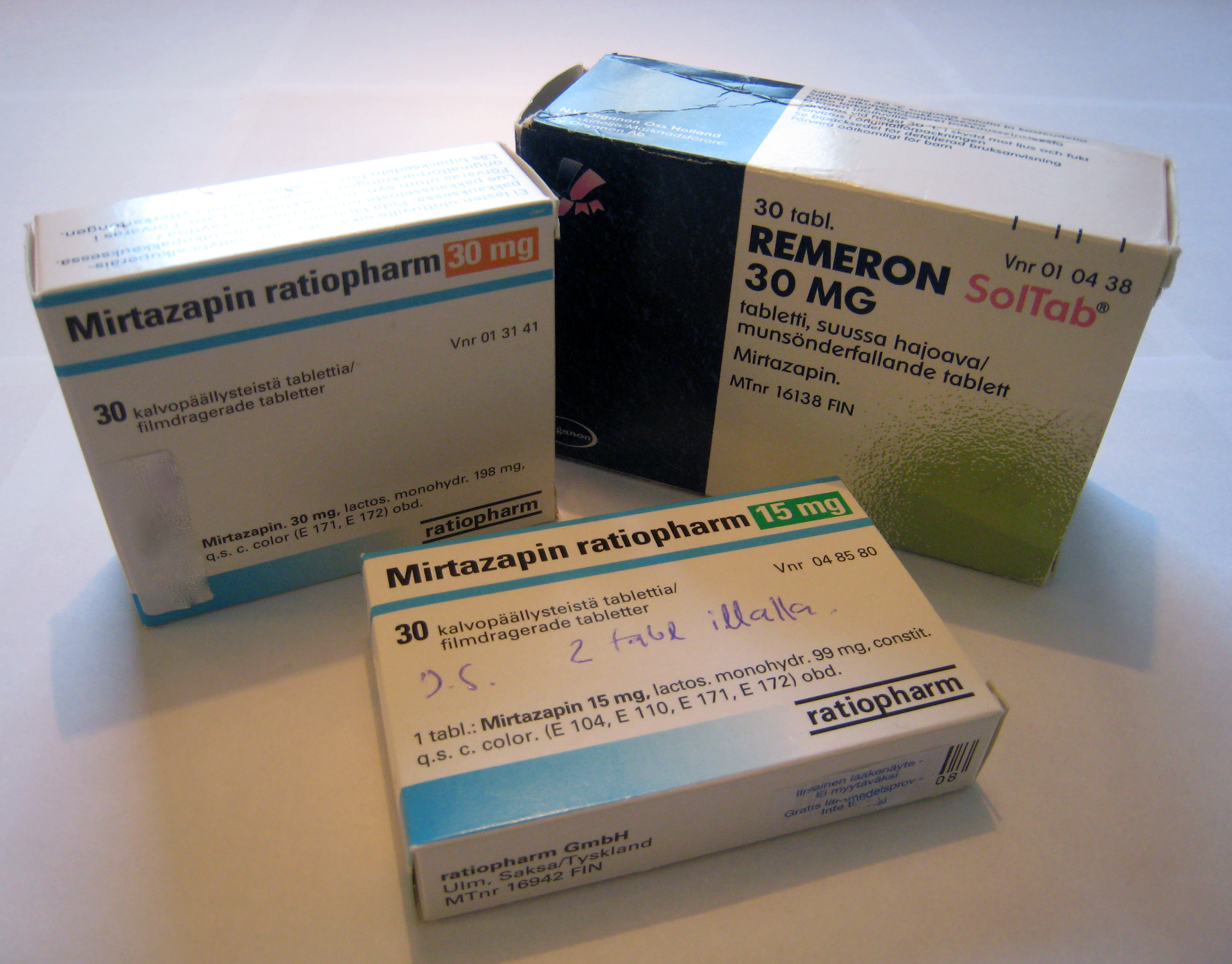 Mirtatsapiiniin perustuvia lääkkeitä